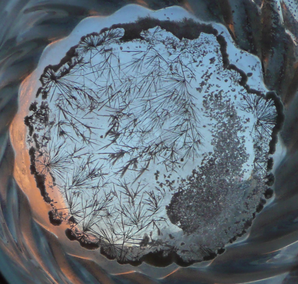 Cristallisation du Guronsan au fond d'un verre après évaporation de l'eau à laquelle il était mélangé.